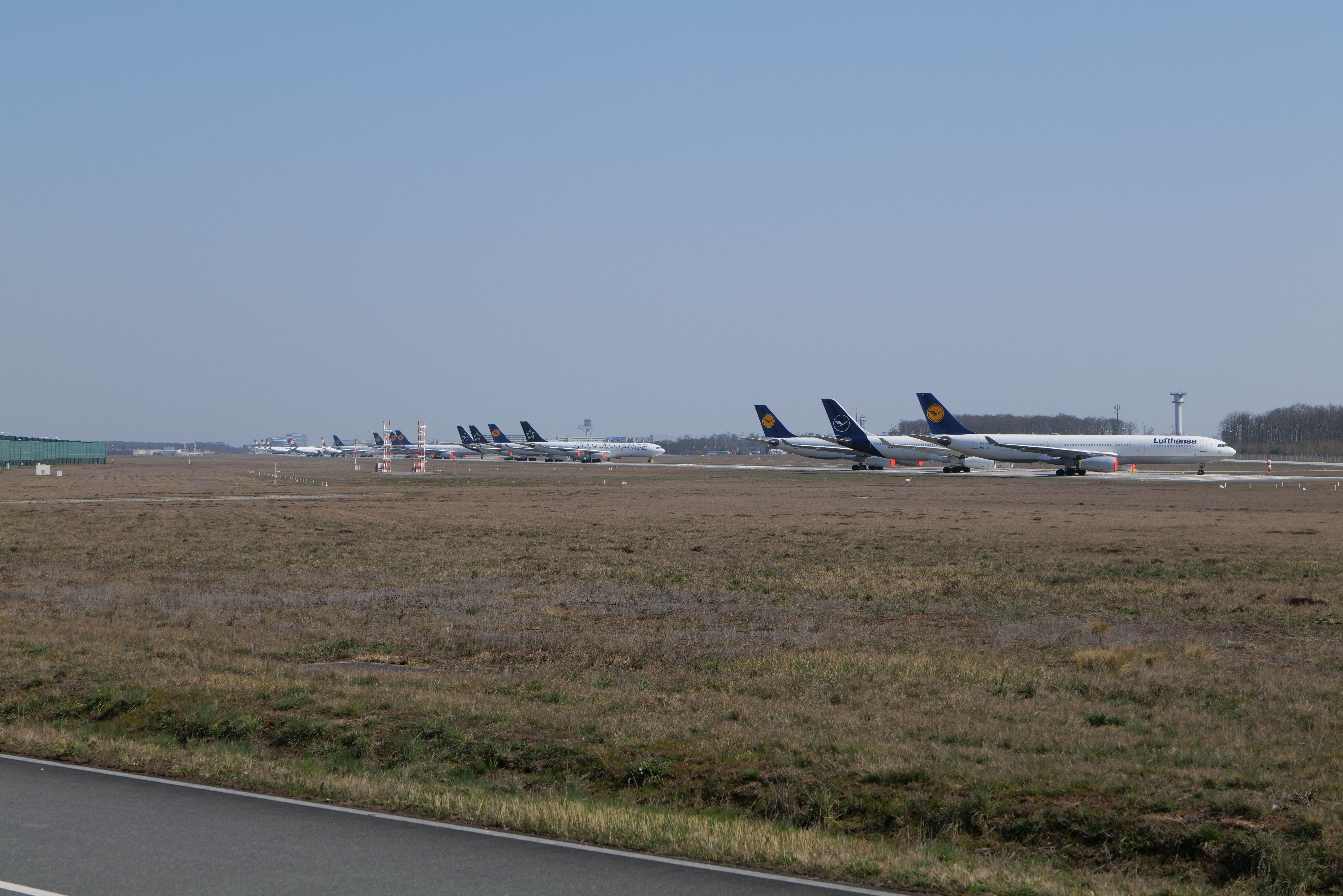 Aufgrund der COVID19 Pandemie nicht genutzte und auf der Landebahn Nordwest des Frankfurter Flughafens abgestellte Flugzeuge am 27. März 2020.